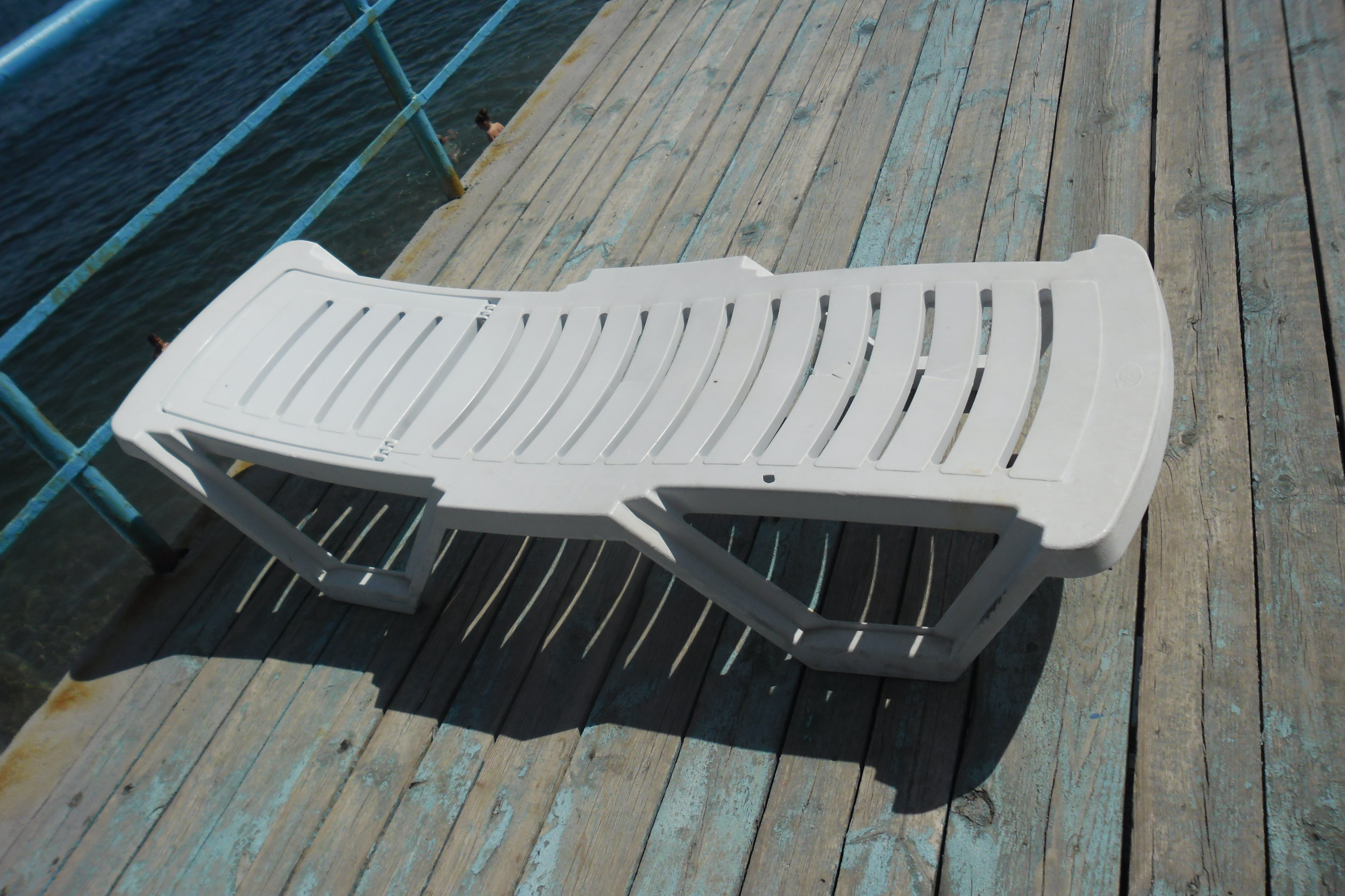 Лежак